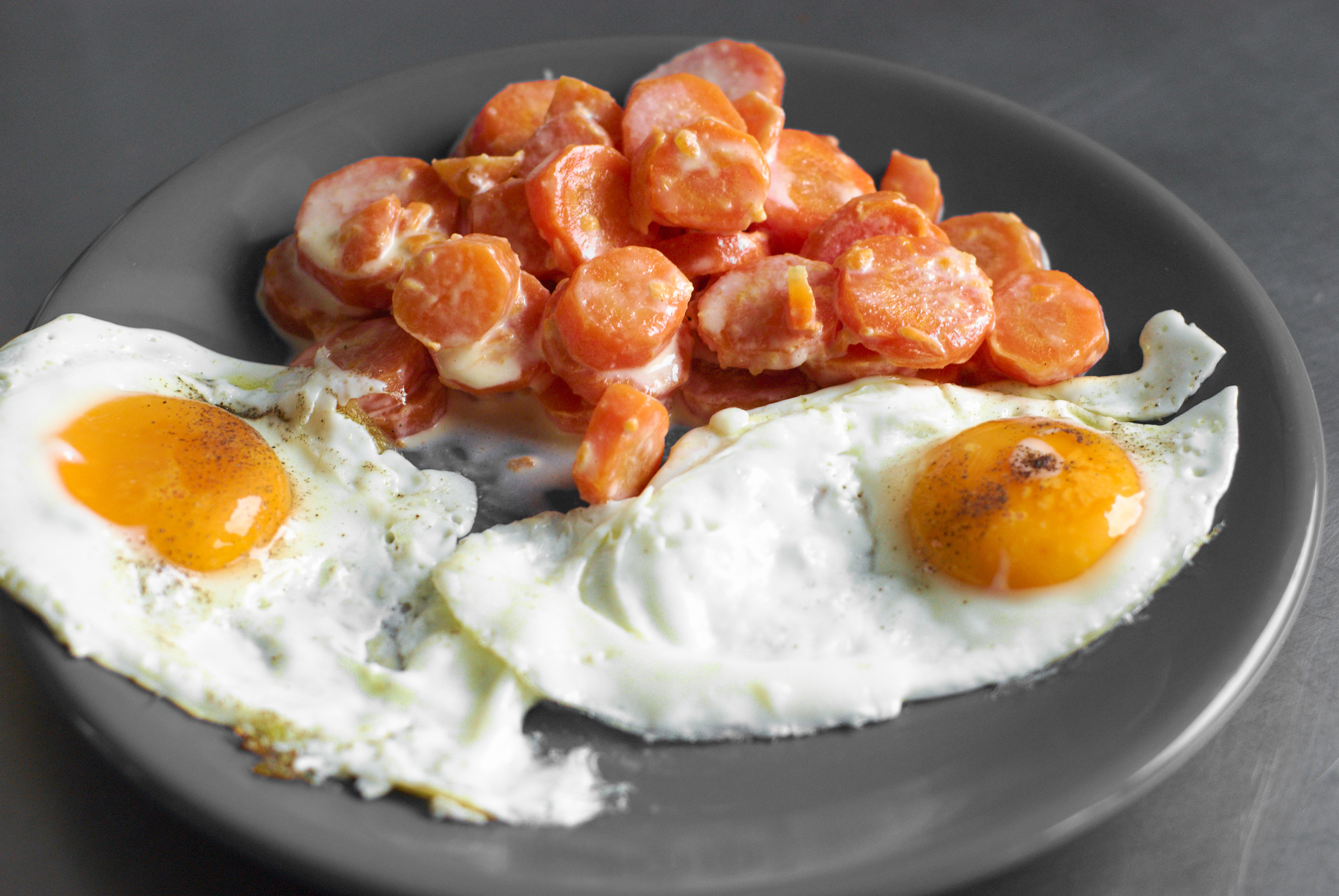 Œufs au plat et carottes à la crème et au parmesan / Sunny-side up eggs and carrots with parmesan and cream